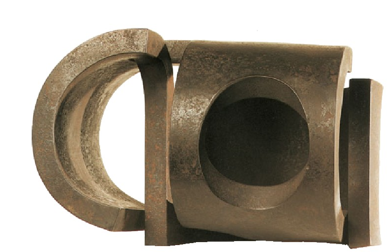 “La casa del poeta” (1982), Eduardo Chillidarena.